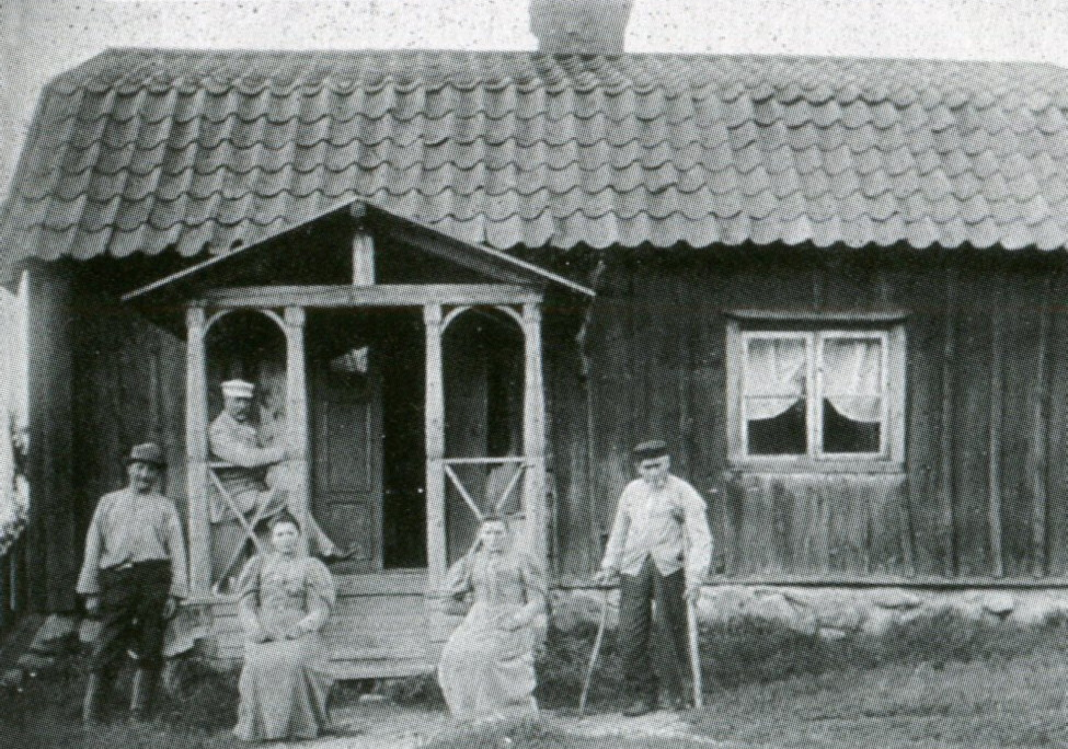 Torpet Garpkroken omkring sekelskiftet 1900